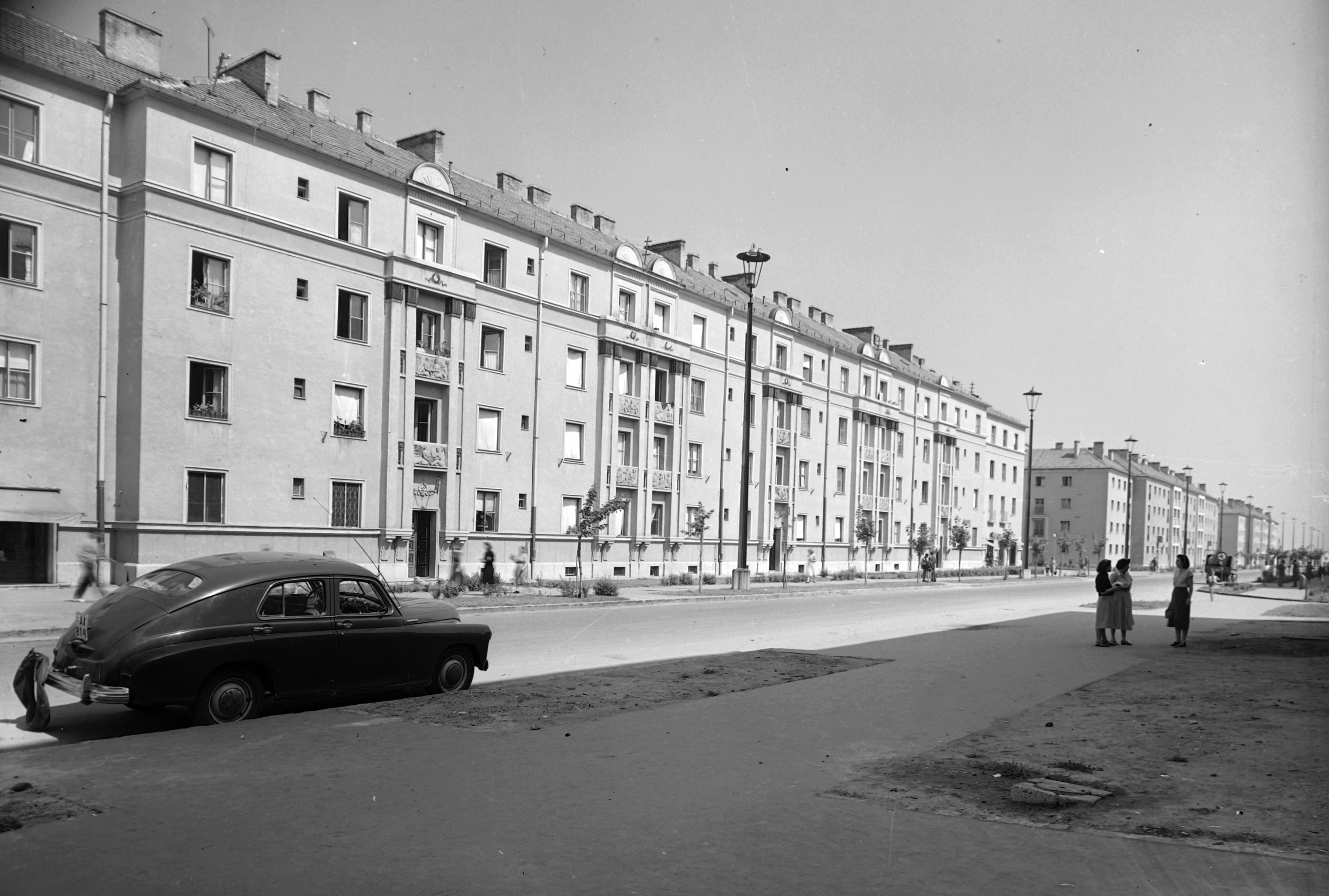 Egressy Béni (Lenin) út a 21. számtól nézve. Location: Hungary Tags: automobile, street view, M20 Pobieda, GAZ-brand Title: Egressy Béni (Lenin) út a 21. számtól nézve.